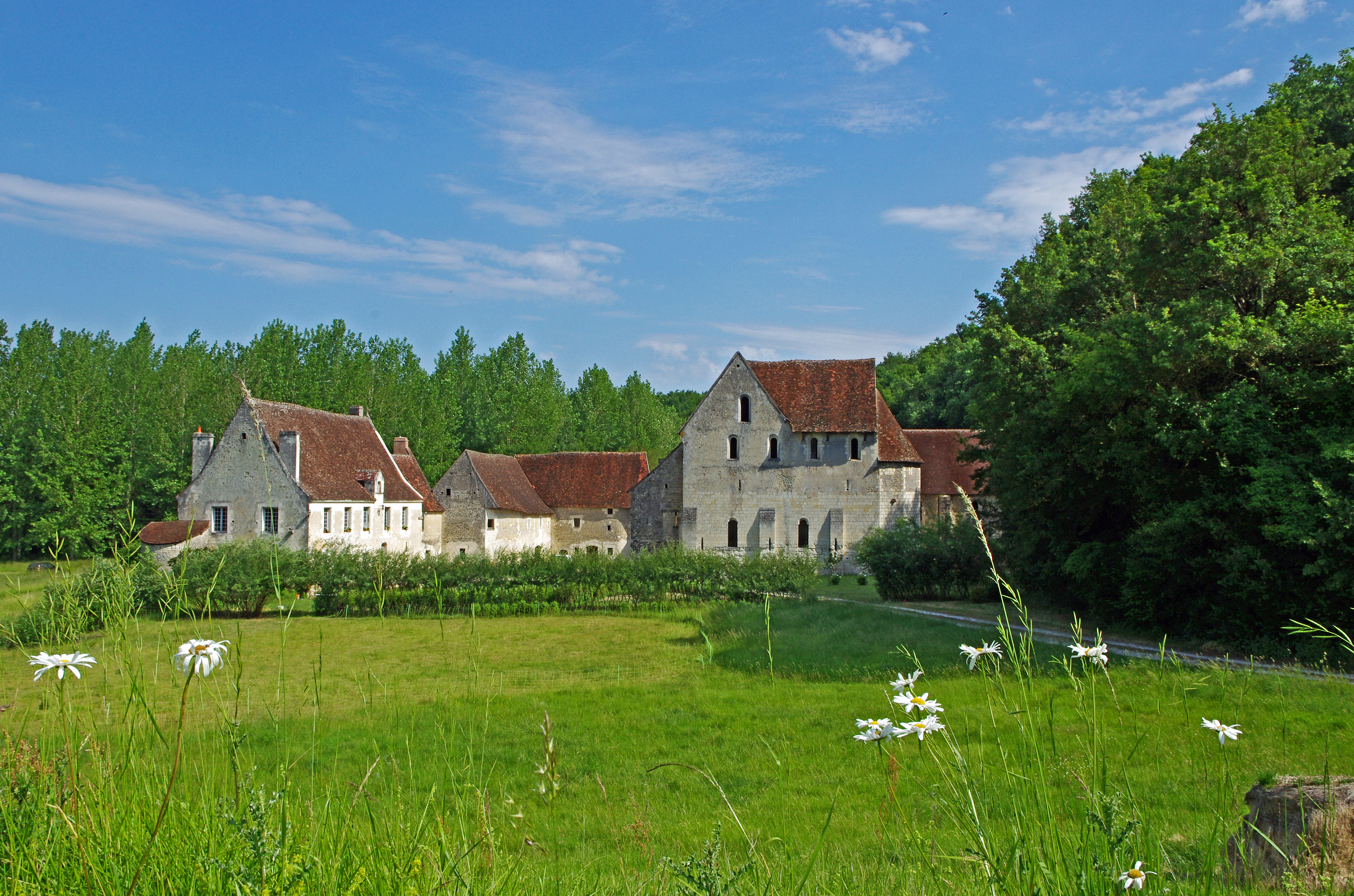 Chemillé-sur-Indrois (Indre-et-Loire) La Corroirie. Fief féodal, seigneurie et monastère des frères chartreux, à l'orée de la forêt de Loches. Ancienne dépendance de la Chartreuse du Liget, à 800 mètres de celle-ci en suivant le ruisseau du Liget vers l'aval, en dessous d'un étang, la Corroirie est lieu féodal de la Chartreuse et refuge des religieux en cas de troubles. Afin de préserver la tranquillité des pères chartreux, leur domaine de plus de 1500 hectares, était administré depuis la Corroirie par le père procureur et les frères chartreux. Son pont-levis, ses douves et ses fortifications en font une place forte. Une des portes est intacte, reconstruite au XVe siècle, elle se présente sous la forme d'une tour carrée, pourvue d'un chemin de ronde protégé par des mâchicoulis, percée d'une porte et d'une poterne autrefois défendues par des ponts-levis. La chapelle date de des XIIe-XIIIe siècles, mais elle a été surélevée au XVe siècle de deux étages, dont le premier est muni de meurtrières. Elle comprend une nef à deux travées prolongée par une abside à quatre pans. Elle conserve l'allure militaire de l'ensemble, mais est dans style Plantagenet à l'intérieur. Elle comprend une nef à deux travées prolongée par une abside à quatre pans. La prison est une tourelle isolée des autres bâtiments. Son unique accès se faisait par une porte percée à l'étage, la cellule se trouvant au rez-de-chaussée.